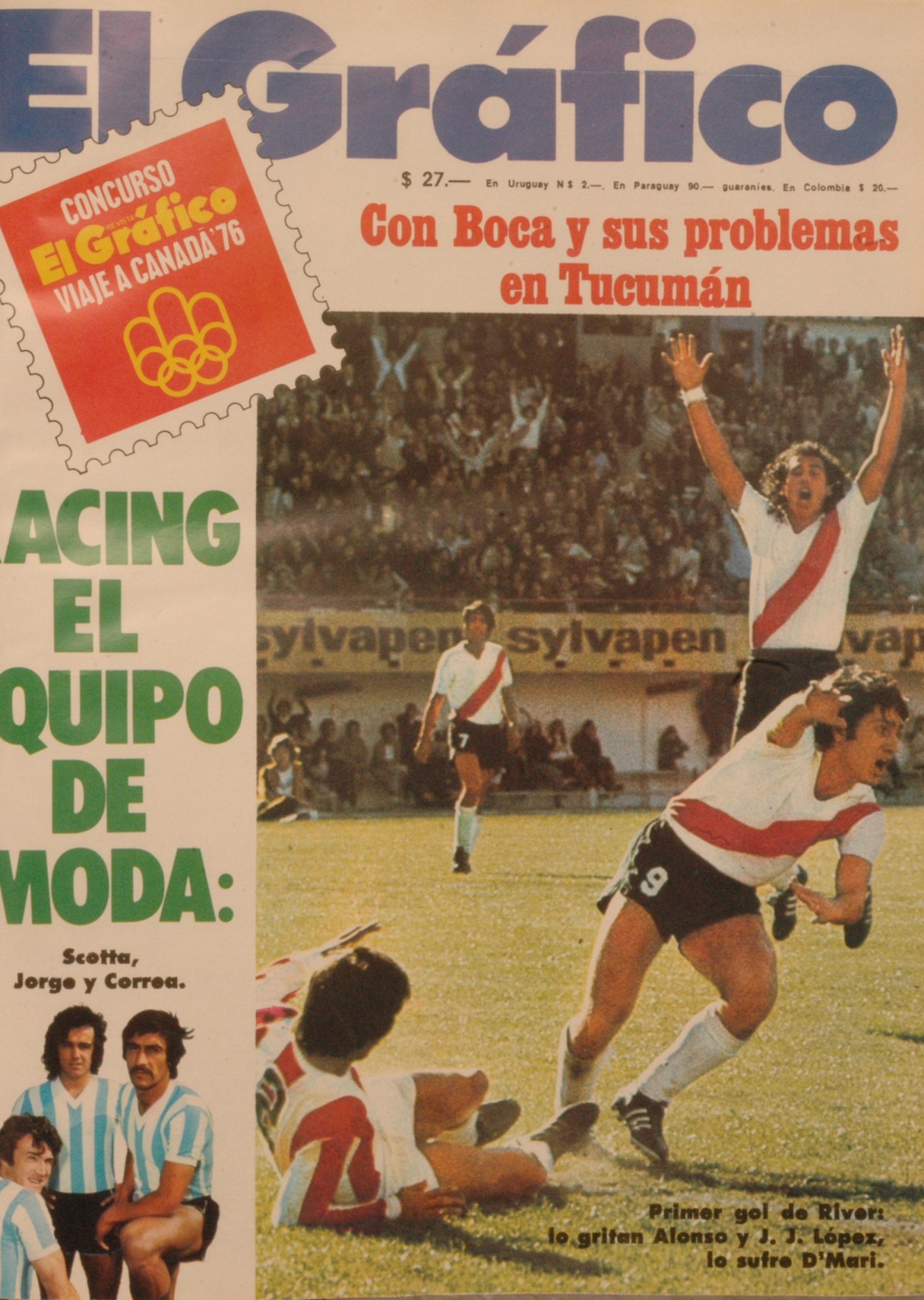 El Grafico del 01 de Octubre de 1975. Edicion 2921